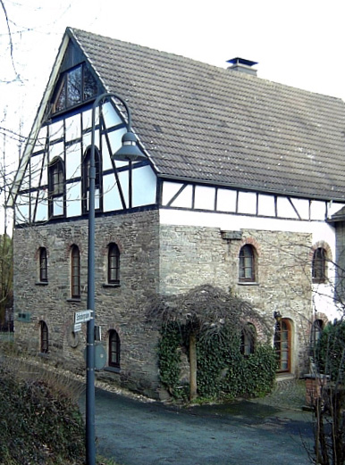 Kunsthaus Alte Mühle in Schmallenberg, Germany.